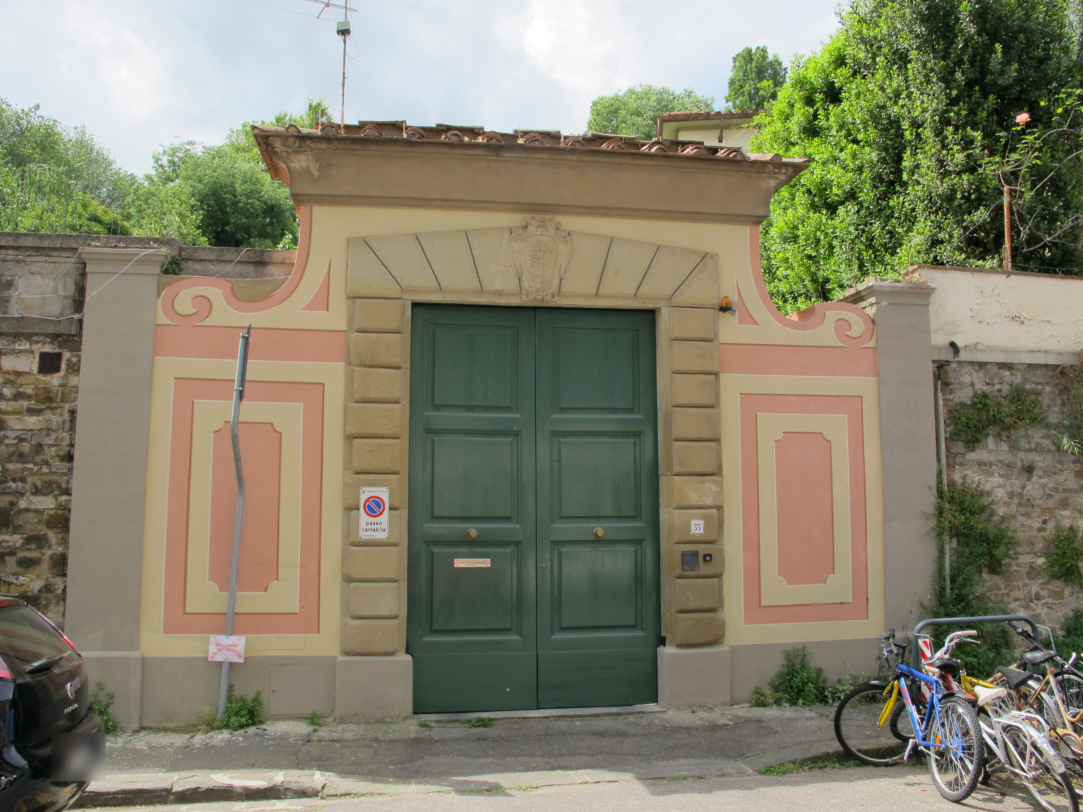 Firenze, miscellanea